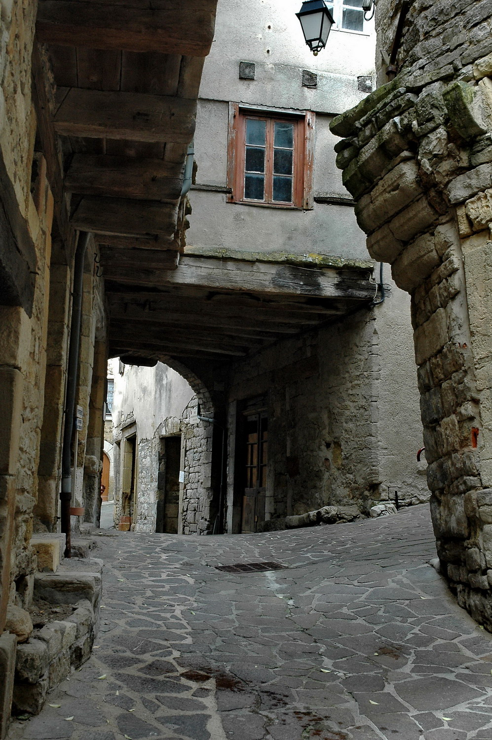 cité de Sévérac-le-Château (Aveyron)